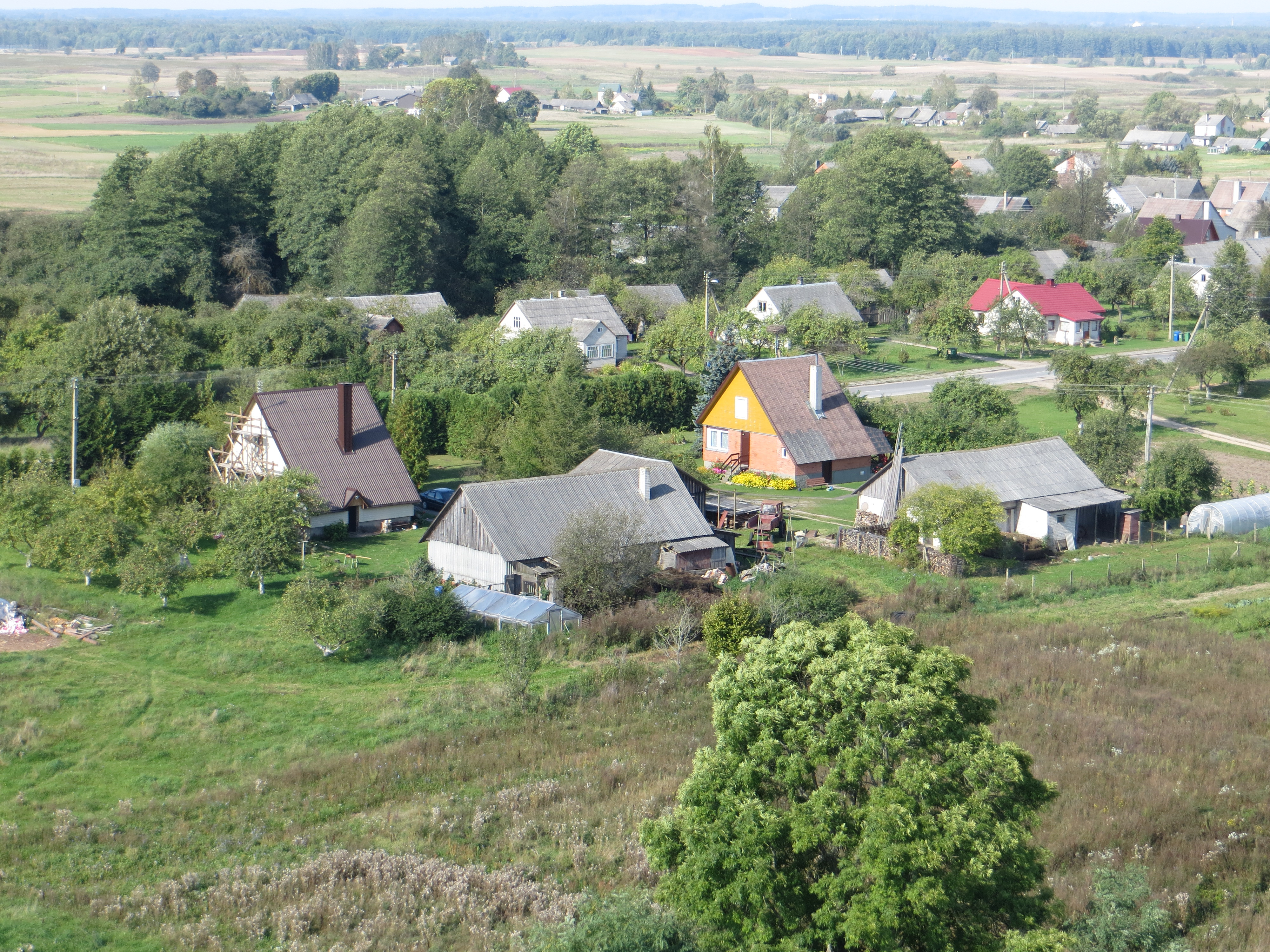 Varėnos sen., Lithuania